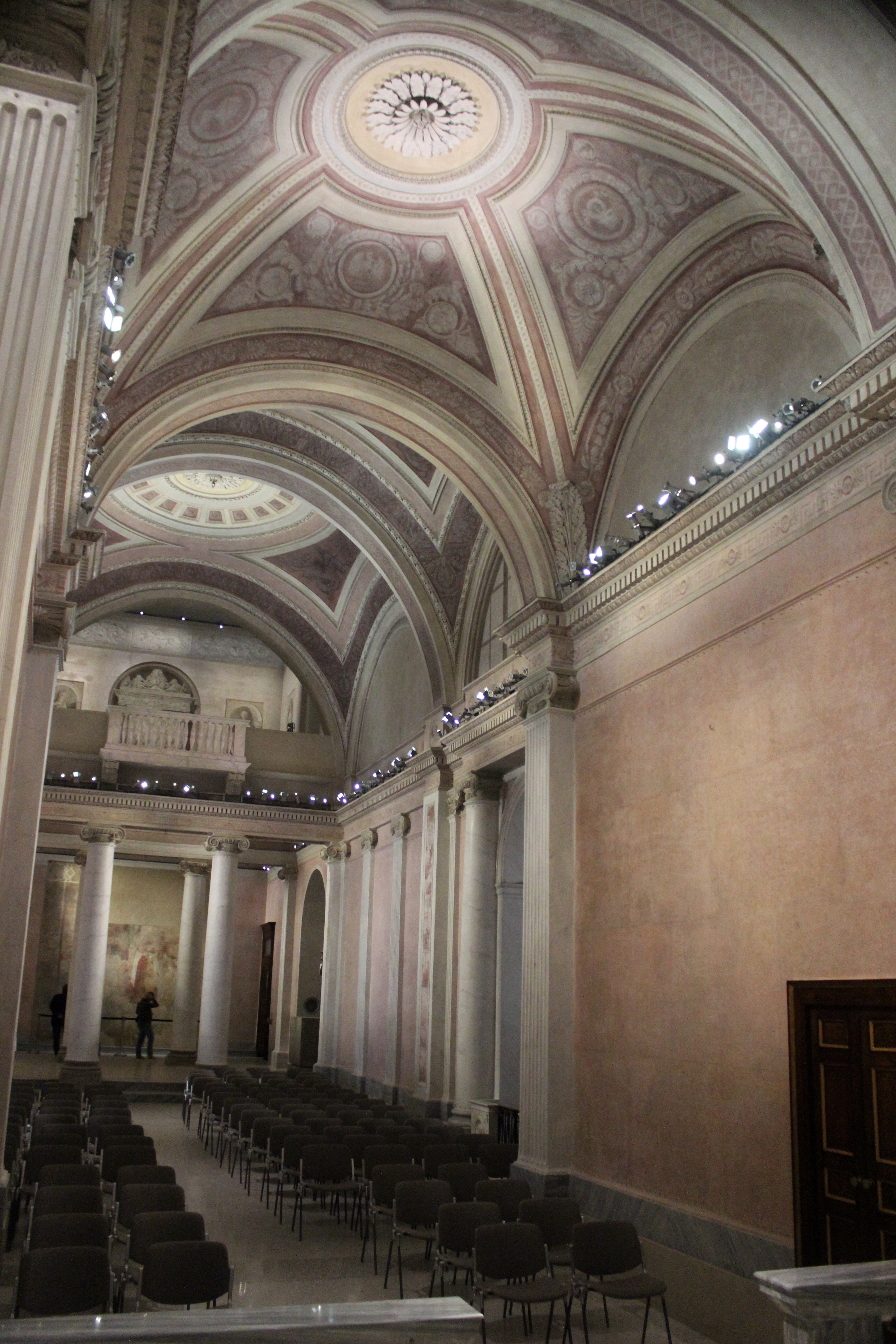 Milán. San Gottardo in Corte. Interior.